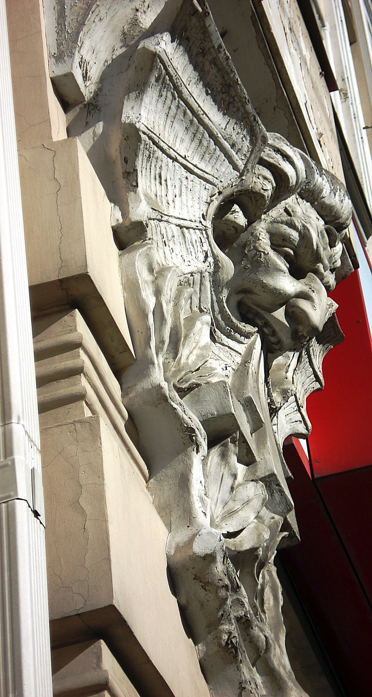 Доходный дом К.Х. Бахчисарайцева: проспект Буденновский, 26/57, улица Социалистическая, литер А, Ростов-на-Дону, Ростовская область